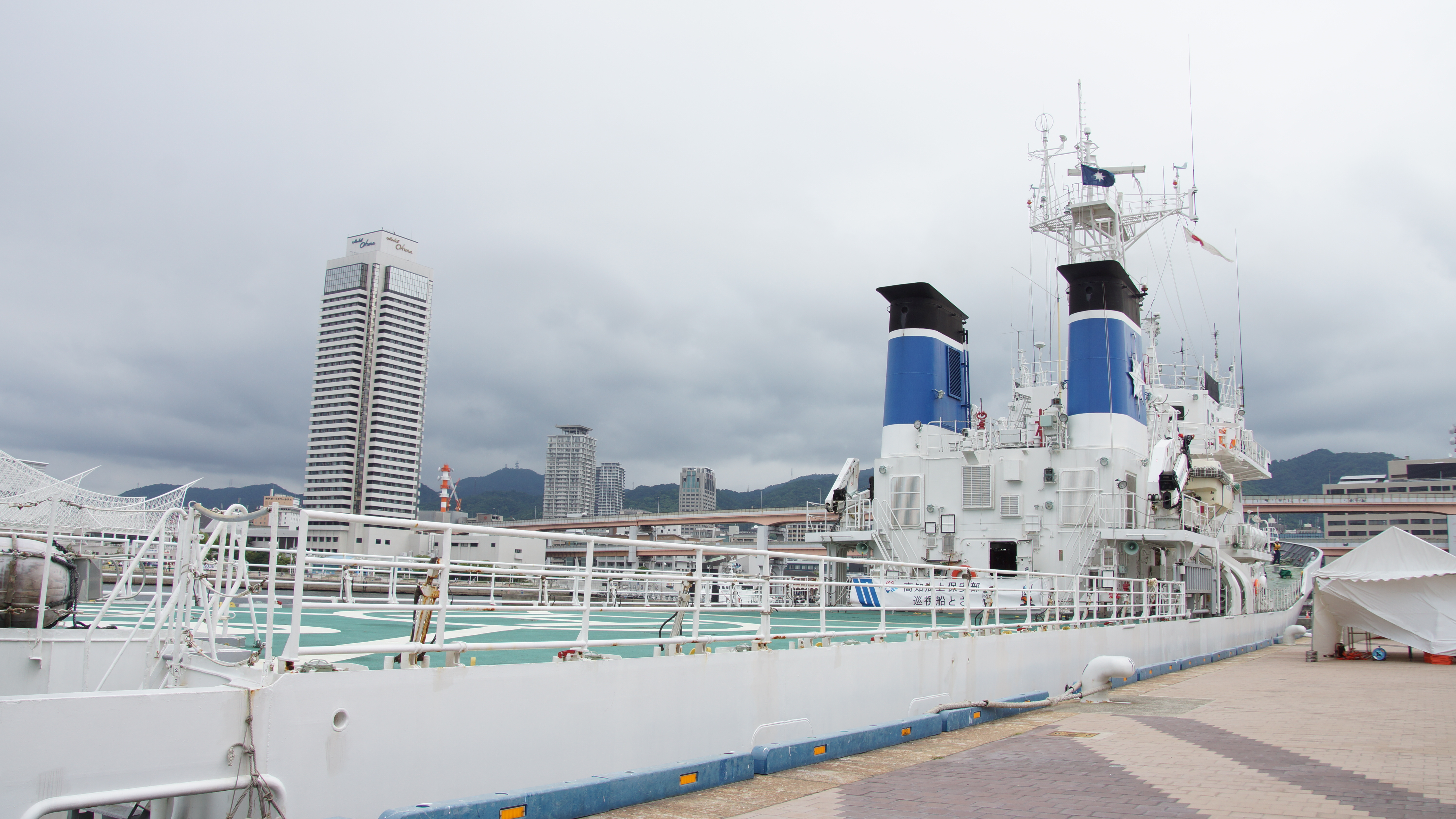 海上保安庁 巡視船とさ（PL-08） ヘリコプター甲板 右舷後部。2017年7月23日 神戸港にて。